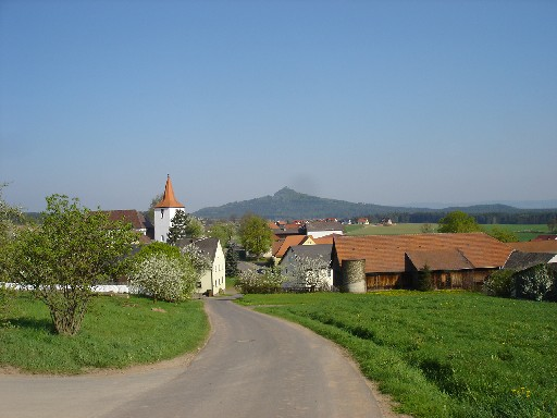 Burkhardsreuth